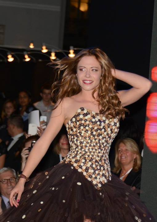 Dounia Coesens au défilé de mode du salon du chocolat.